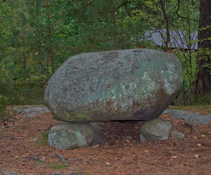 Uppallat block i Blackeberg (RAÄ-nr Bromma 147:1), Bromma socken, Stockholms kommun, Stockholms län, Uppland, Sverige. Det är dock osäkert om blocket är en fornlämning i form av en järnåldersgrav eller naturbildning i form av ett flyttblock.